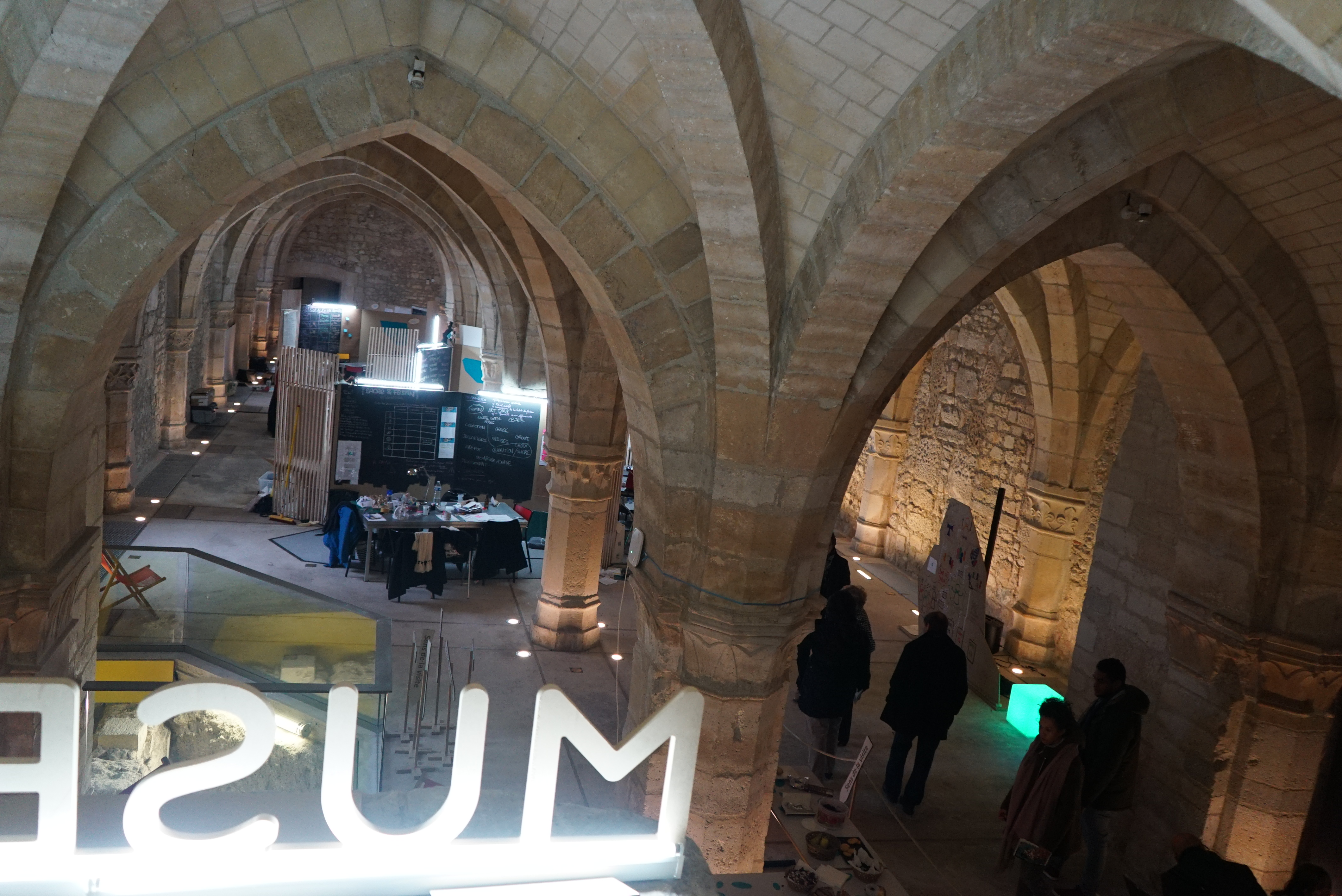 lors de Museomix de 2016 au Palais du Tau.